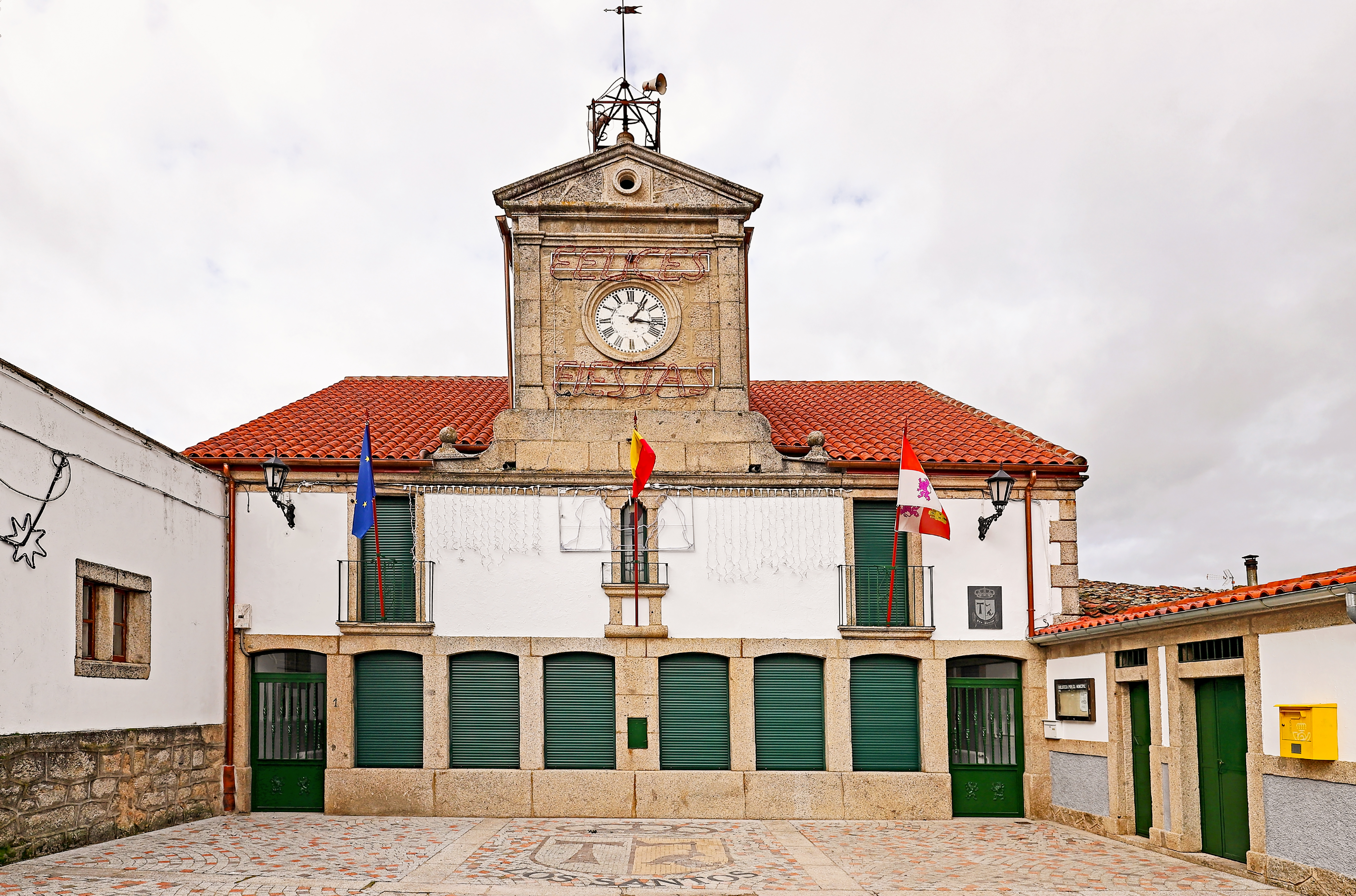 Los Santos es un municipio que pertenece a la comarca de Entresierras, provincia de Salamanca.